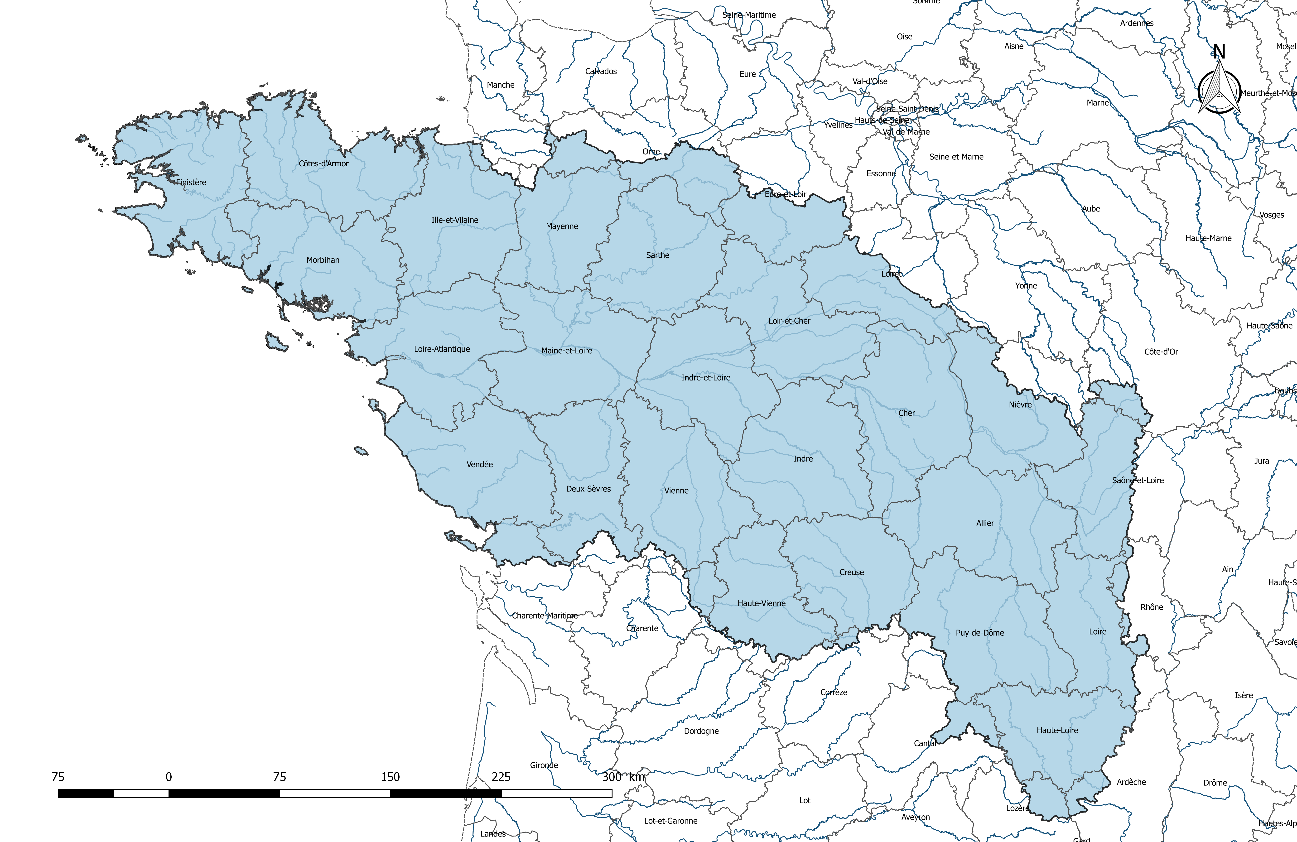 Carte de la circonscription de bassin -Loire-Bretagne en France, avec les départements qui la composent.